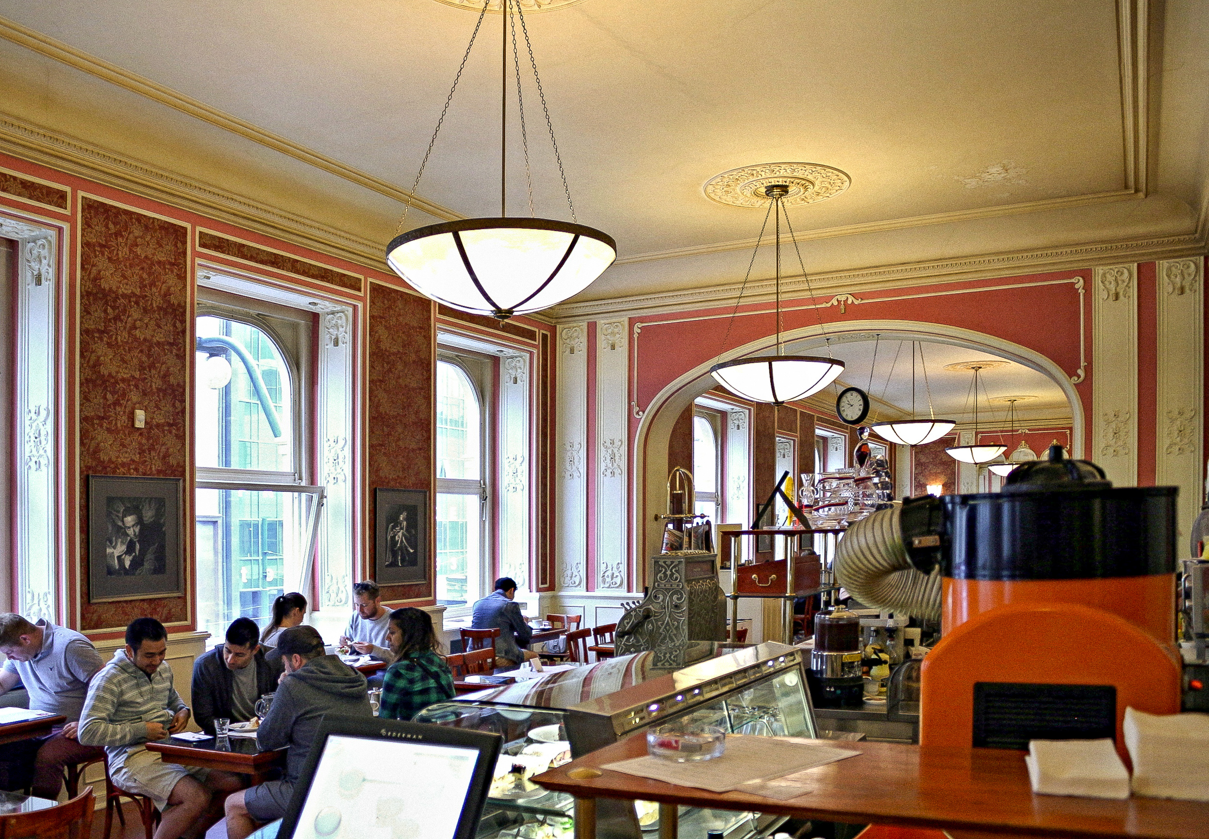 Pražská kavárna Café Louvre